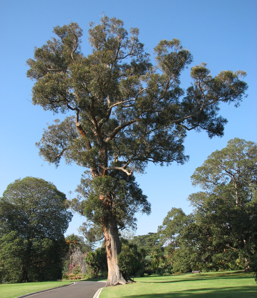 Eucalyptus muelleriana, Royal Botanic Gardens, Melbourne